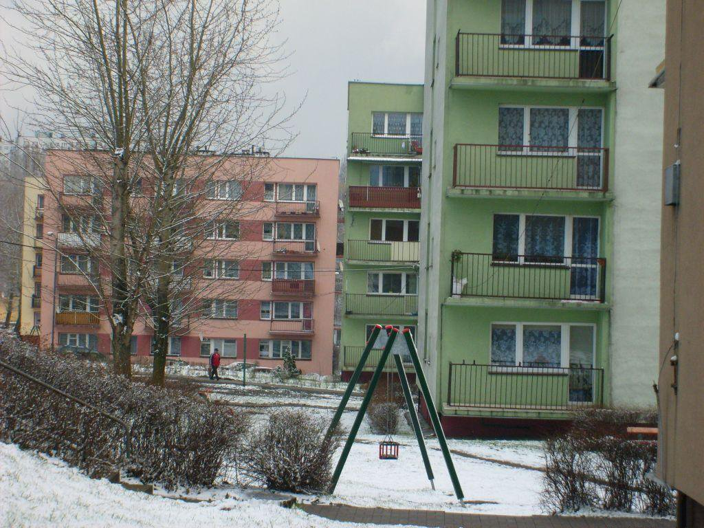 Ruda Śląska, Bykowina - budynki mieszkalne przy ul. Pordzika